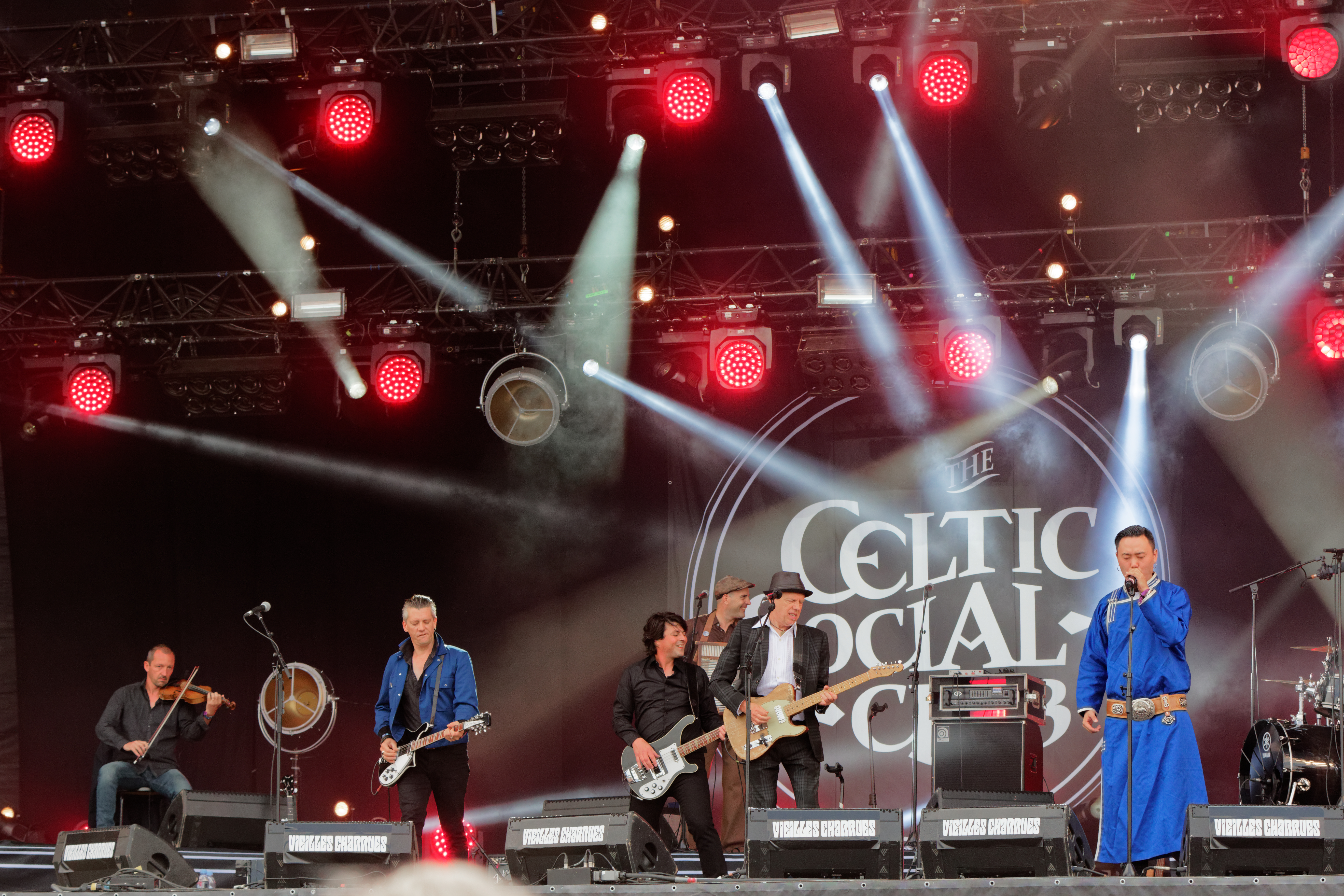 The Celtic Social Club en concert lors du festival des vieilles charrues 2017.